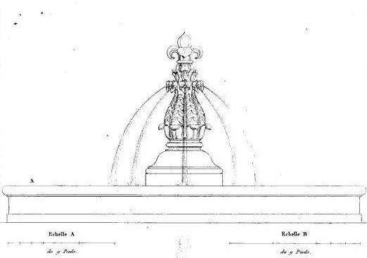 "Fontaine de l'esplanade des Invalides"